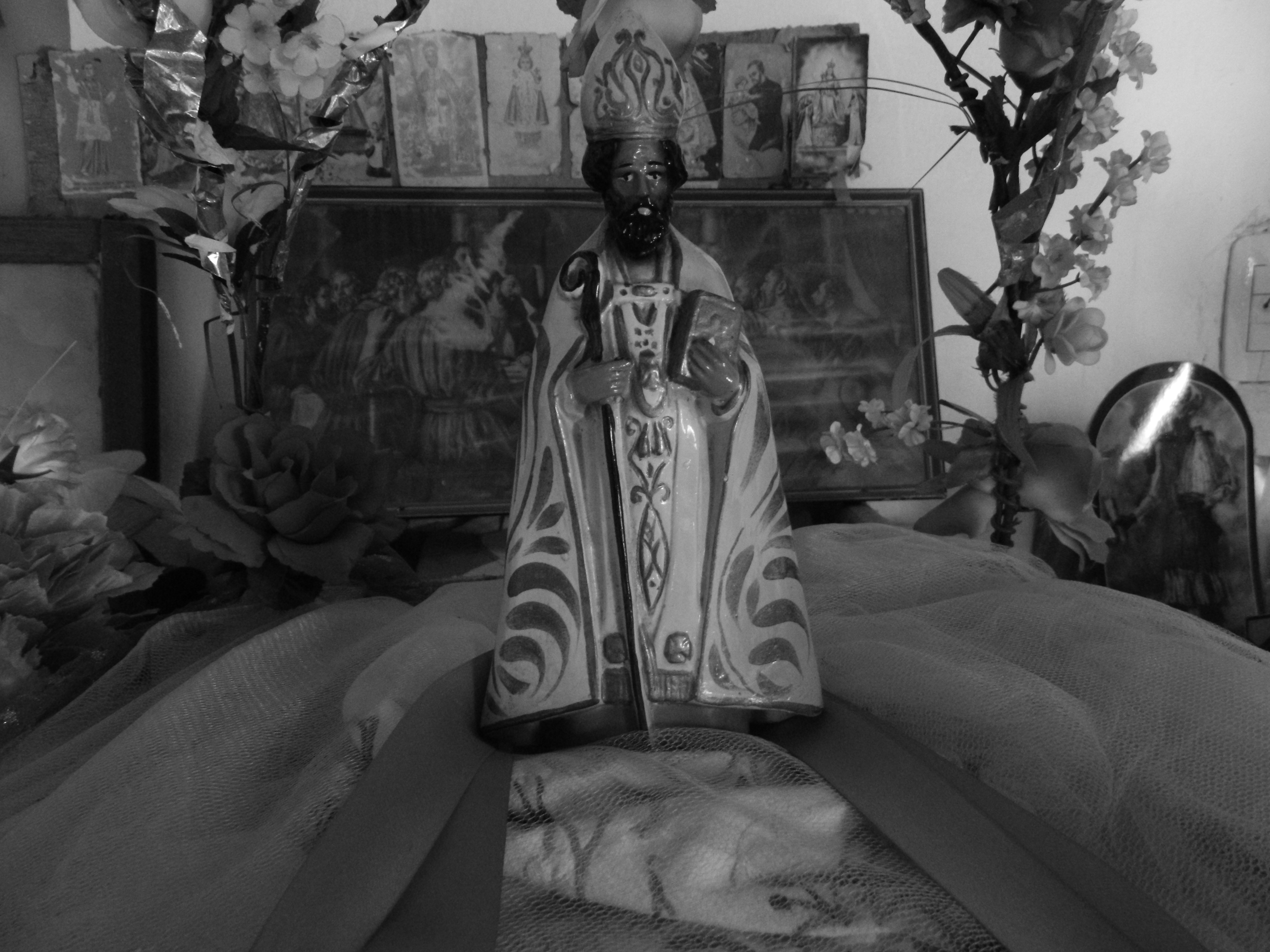 Ubicado en la localidad La Banda, fue construido en el año 1983 por Don Jacinto González, pastor y agricultor, cuenta que su fe por el santo surgió cuando encontró una estampa en medio de piedras, a partir de allí se convierte en su fiel devoto. La imagen del santo fue traída desde San Juan y se lo venera en tres fiestas; el 6 de Julio, el 6 de diciembre y la celebración principal se la realiza el 1 de enero y para esa ocasión Jacinto se viste con una túnica y celebra el mismo la liturgia religiosa